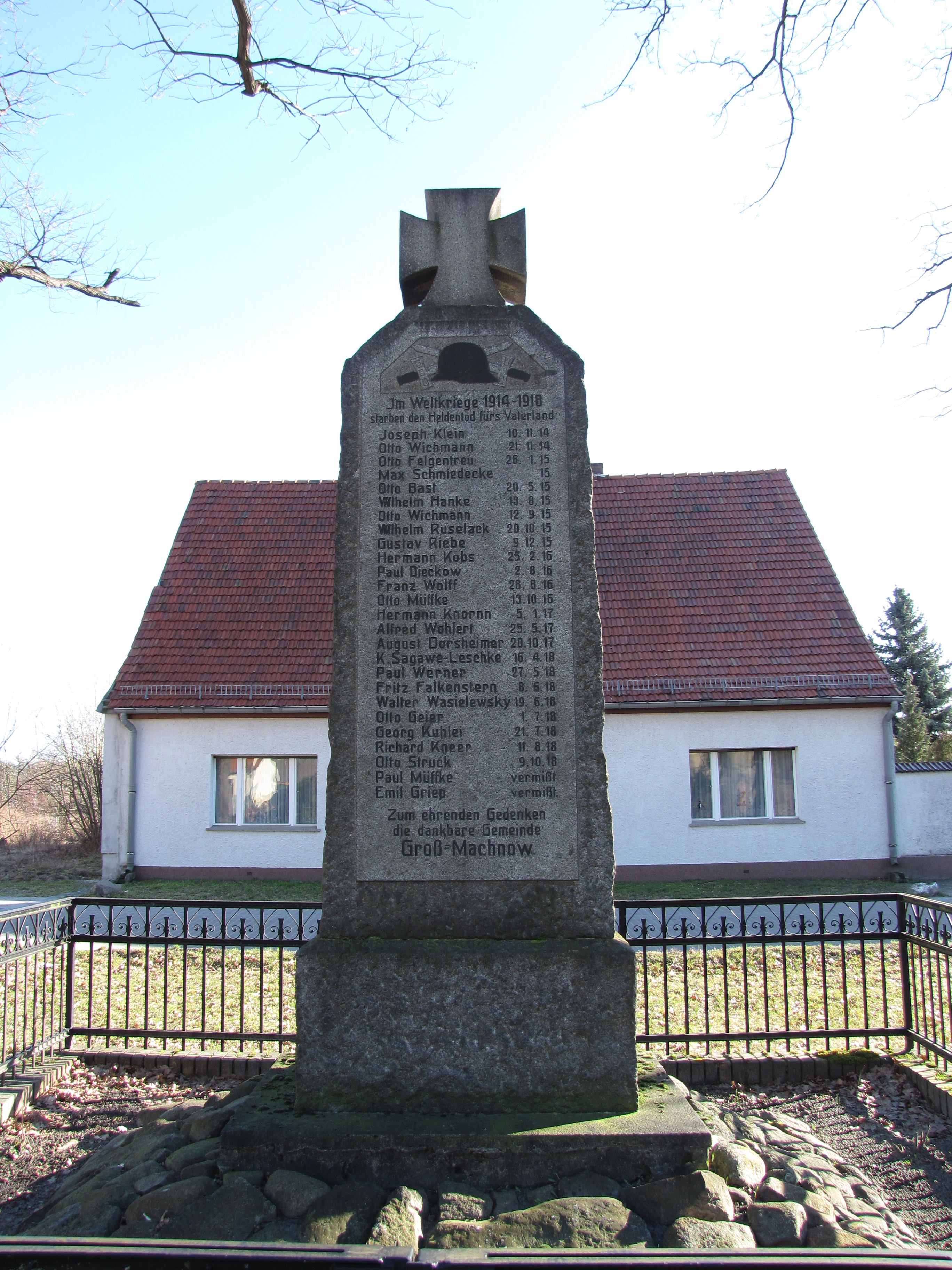 Groß Machnow, Gem. Rangsdorf, Brandenburg, Kriegerdenkmal fpr die Gefallenen des 1. Weltkriegs auf dem Dorfplatz südlich der Dorfkirche